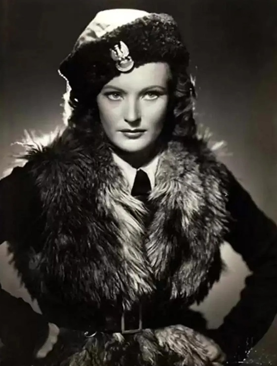 Ирена Андерс (псевдоним Рената Богданьска) - польская киноактриса, певица